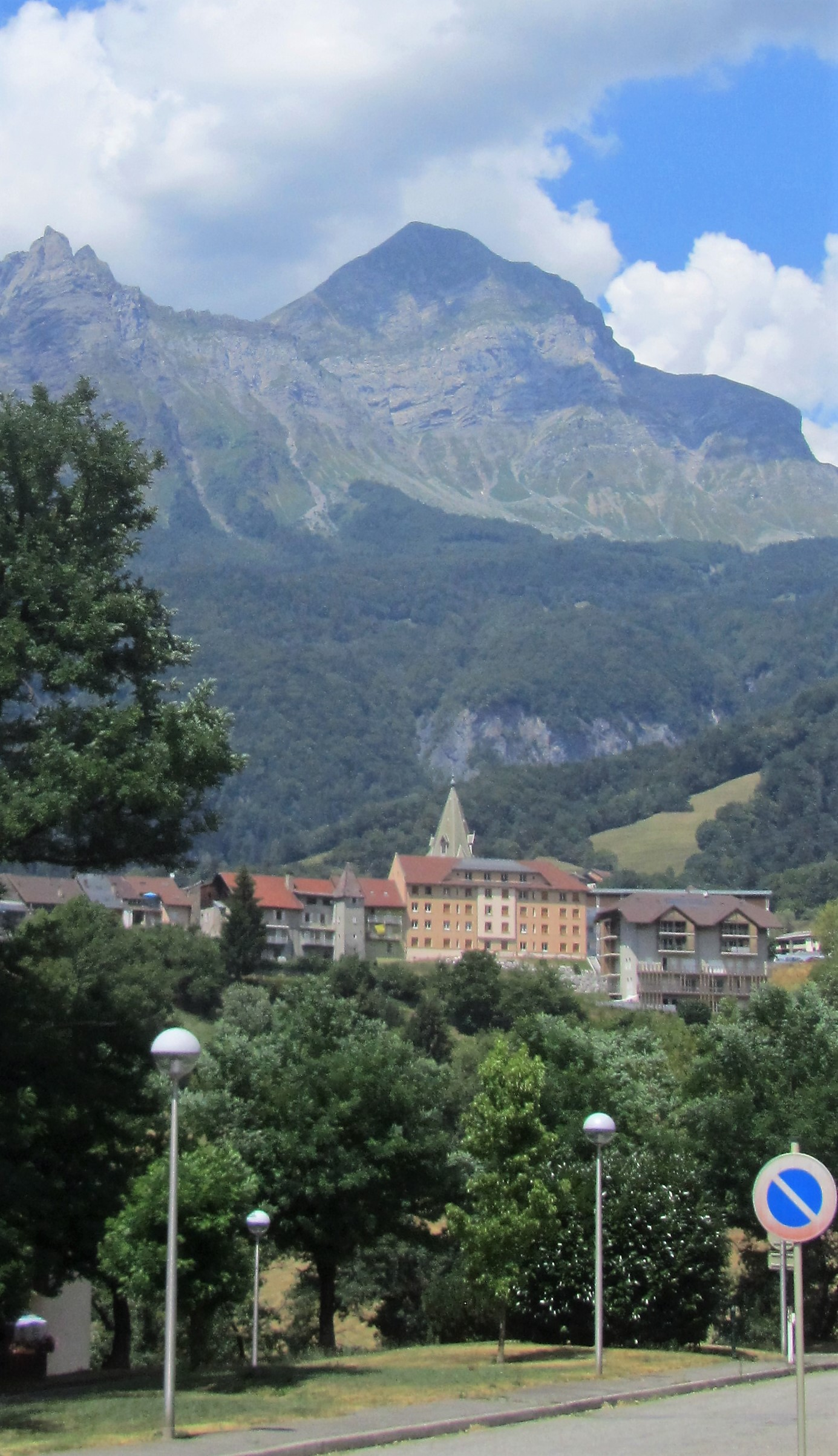 Du clocher au Charvin.